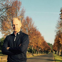 Brynjar Eldon Geirsson